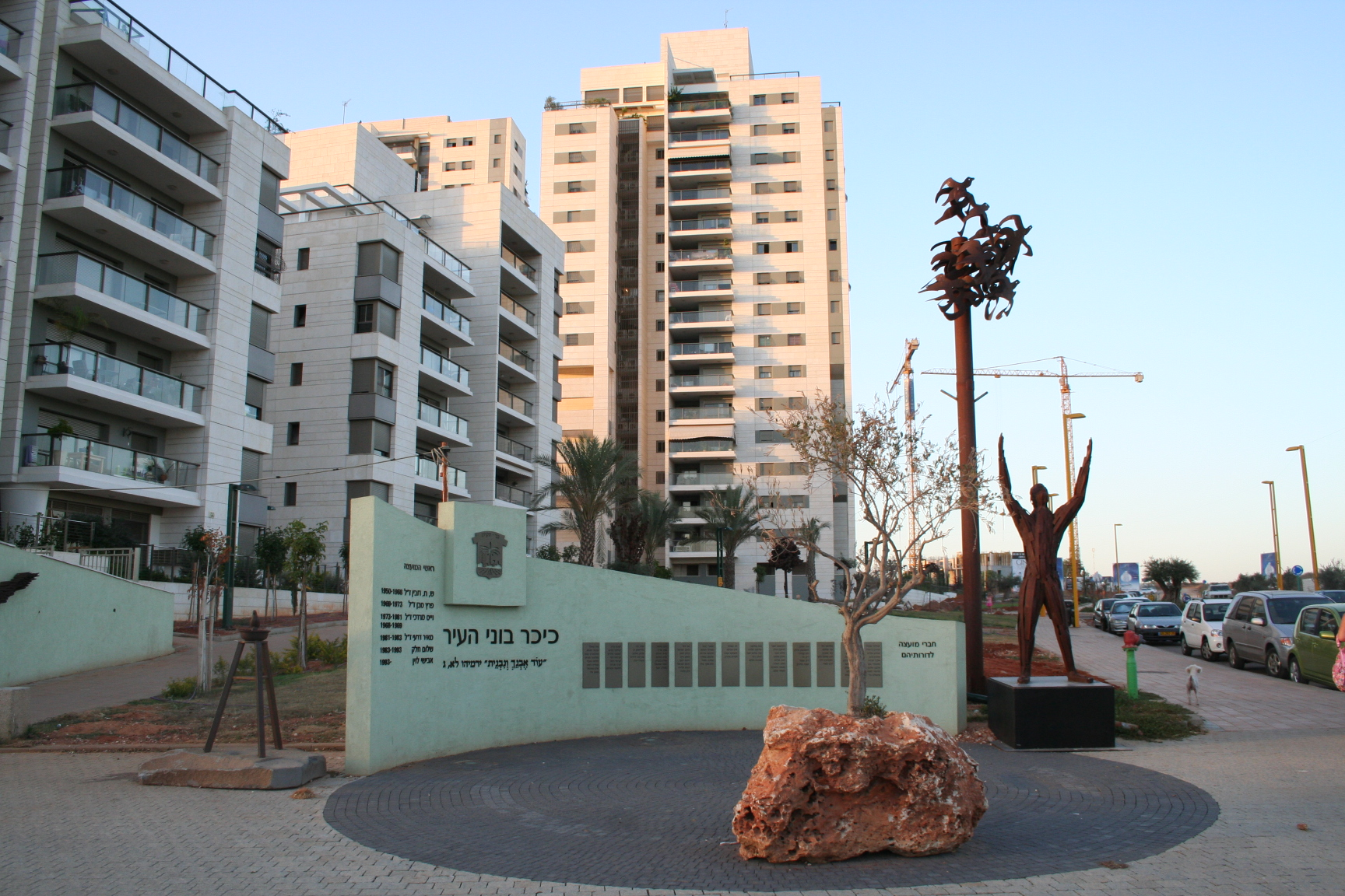 כיכר בוני העיר בכניסה לשכונת גנים החדשה בגני תקווה